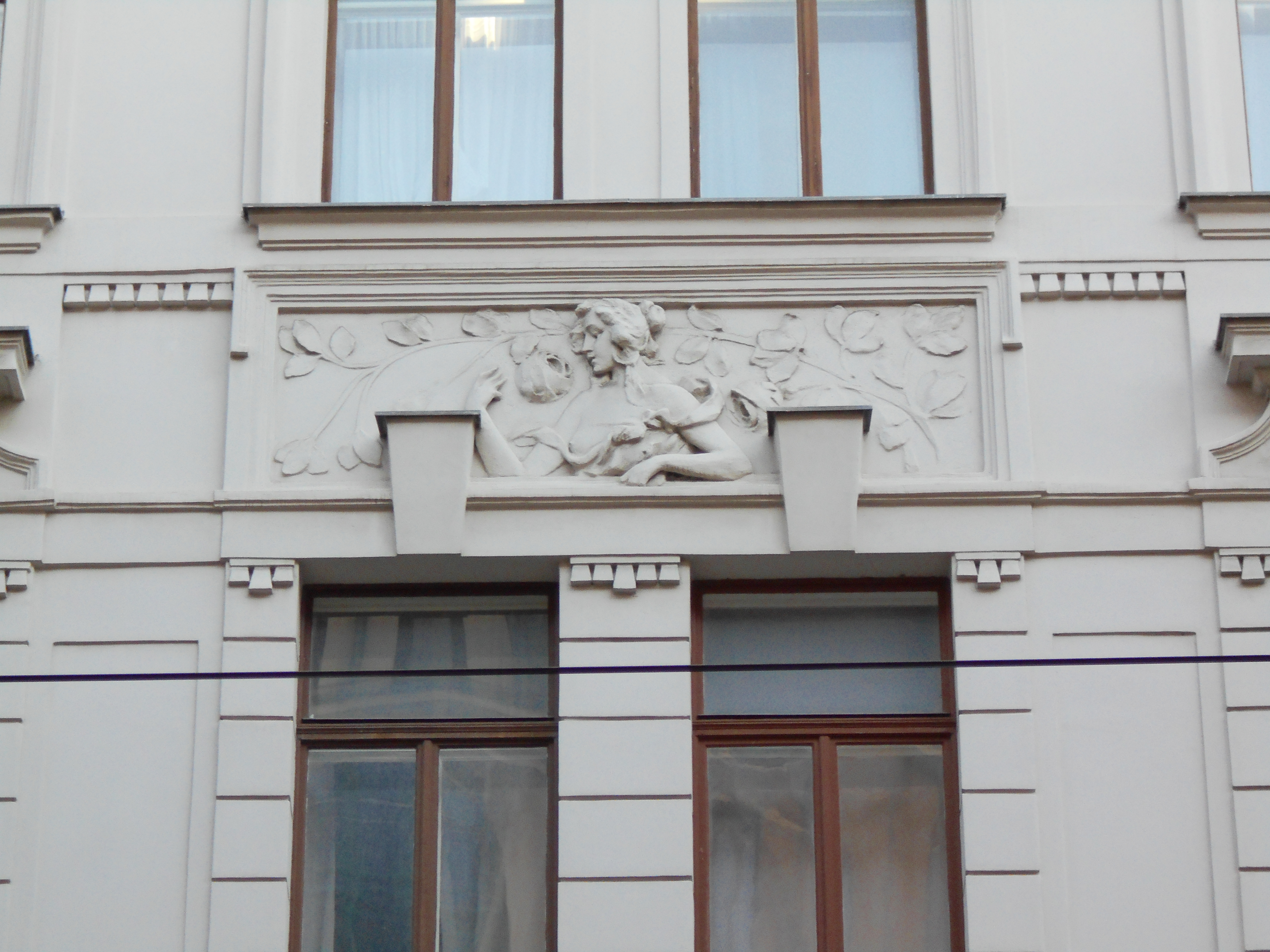 Fassadenrelief des Hauses Ungargasse 53